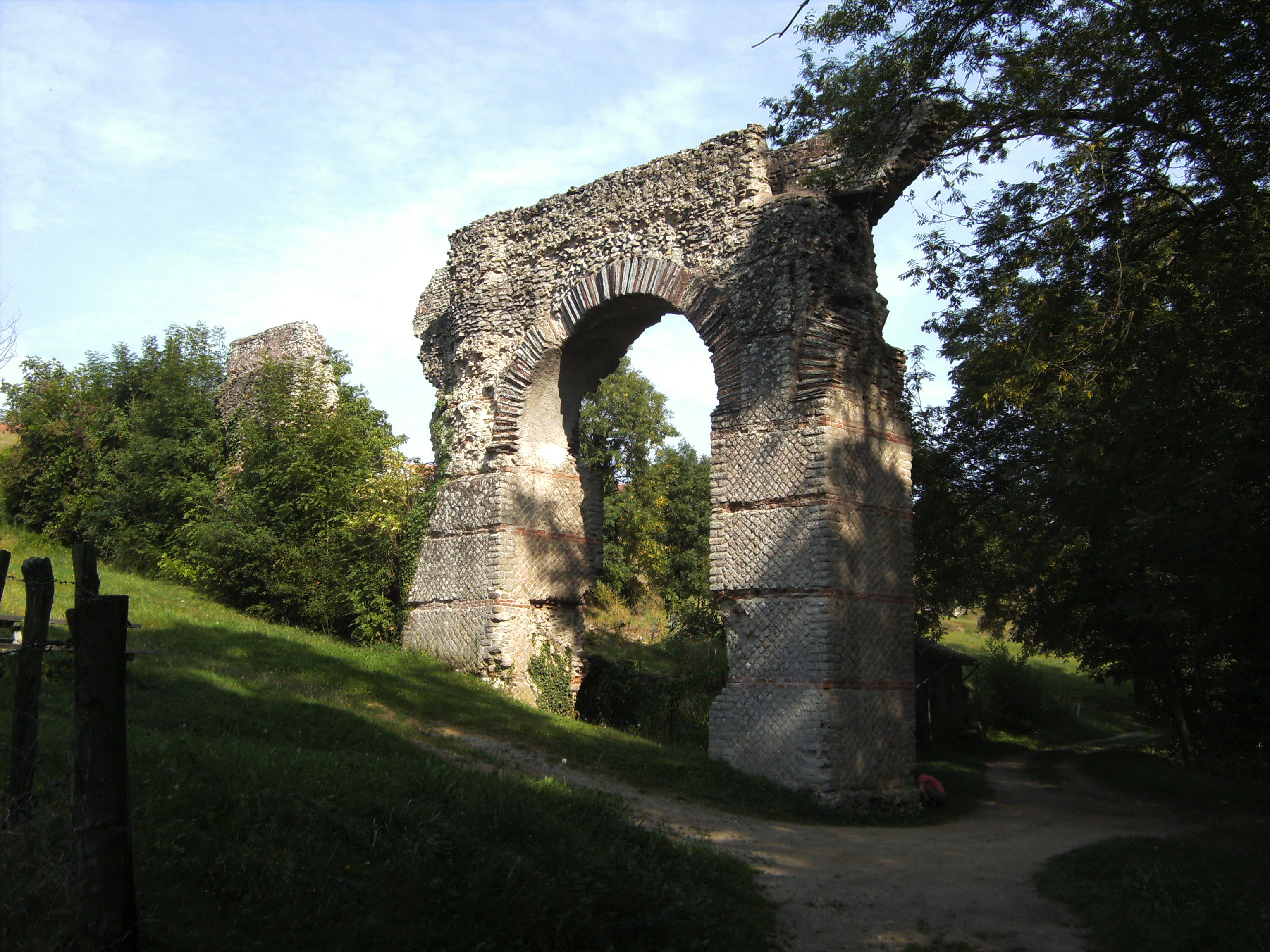 Aqueduc du Gier. Le pont du Mornantet à Mornant.